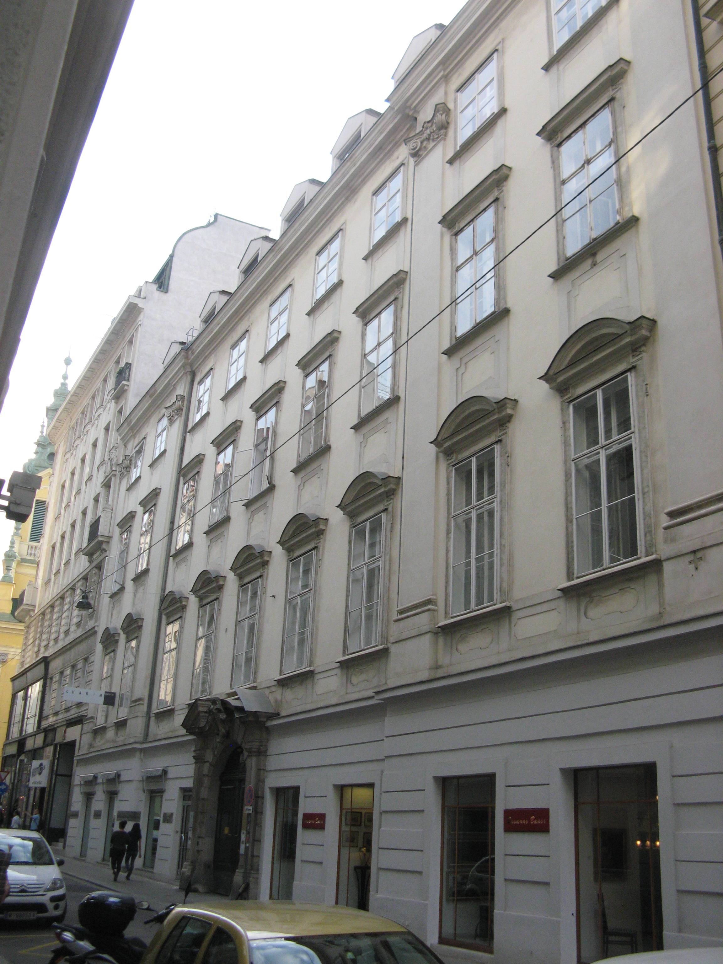 Palais Gatterburg (1698) von Christian Alexander Oedtl, Dorotheergasse 12, Wien-Innere Stadt